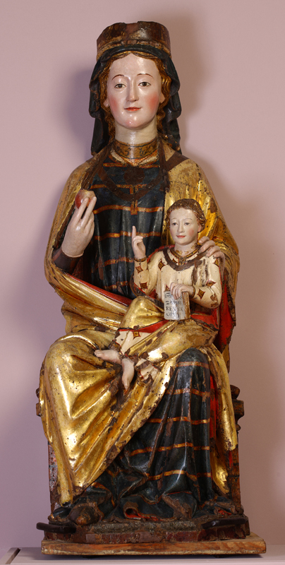 Santa María de Vitoria / Virgen de la Esclavitud Hacia 1278-1280. Madera tallada y policromada. Depósito de la Catedral de Santa María de Vitoria-Gasteiz